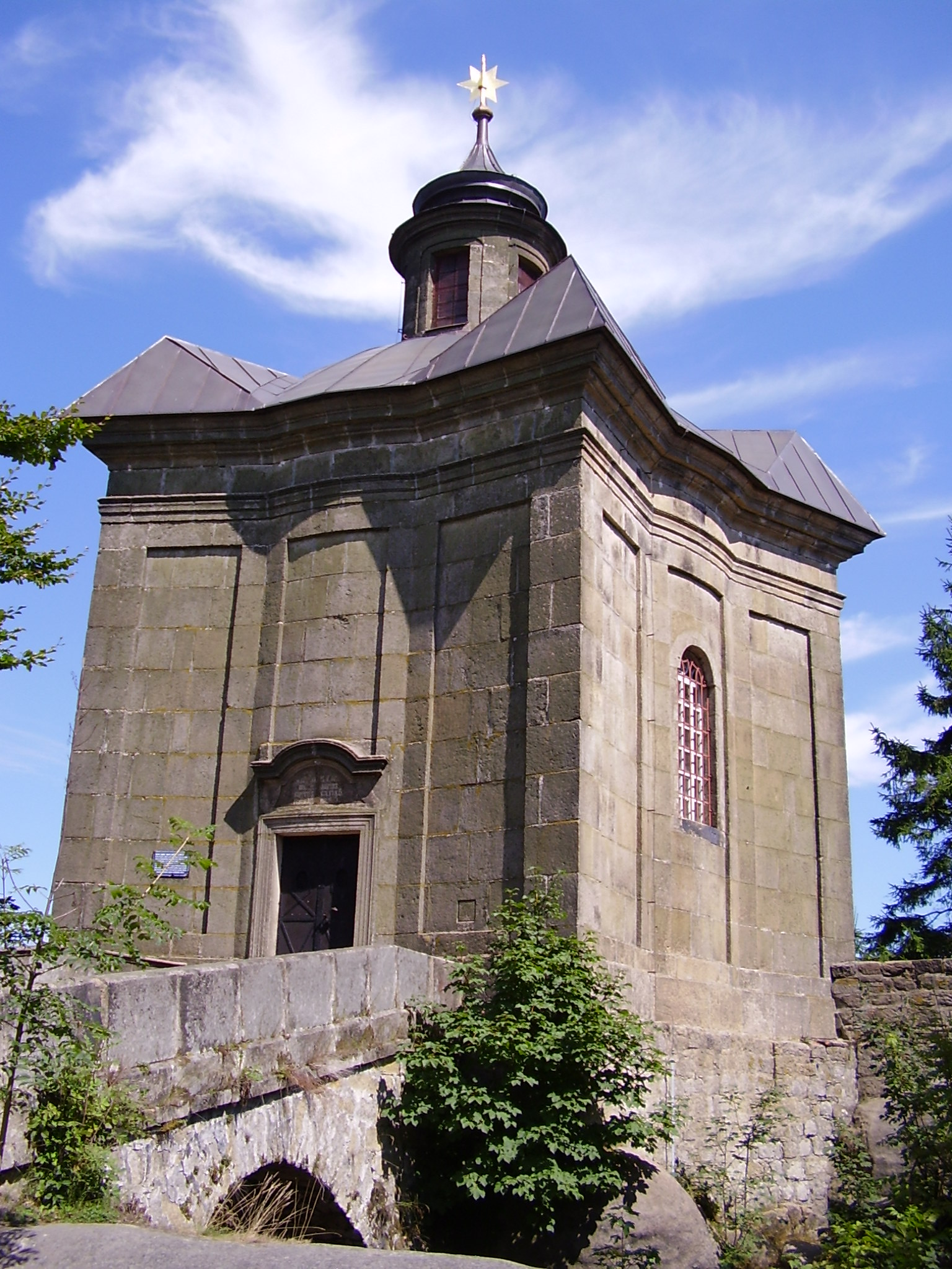 Česky: Hvězda (kaple) - exteriér